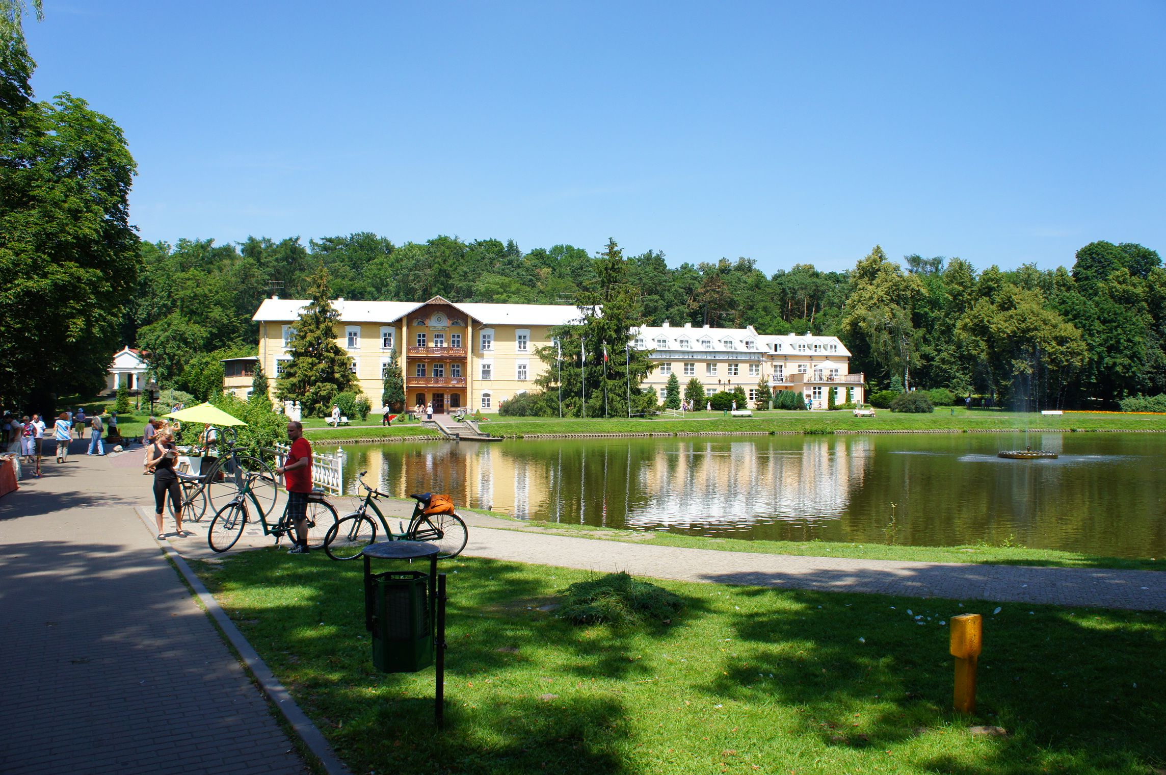 Nałęczów, Poland